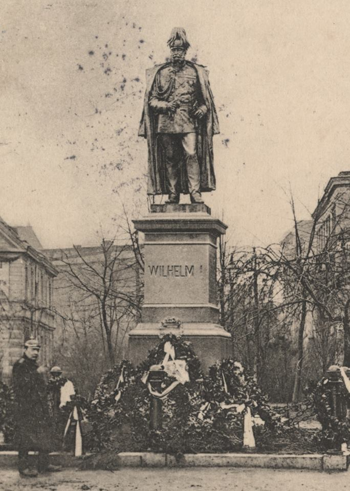 Pomnik Cesarza Wilhelma w Tarnowskich Górach. Fragment pocztówki z początku XX wieku